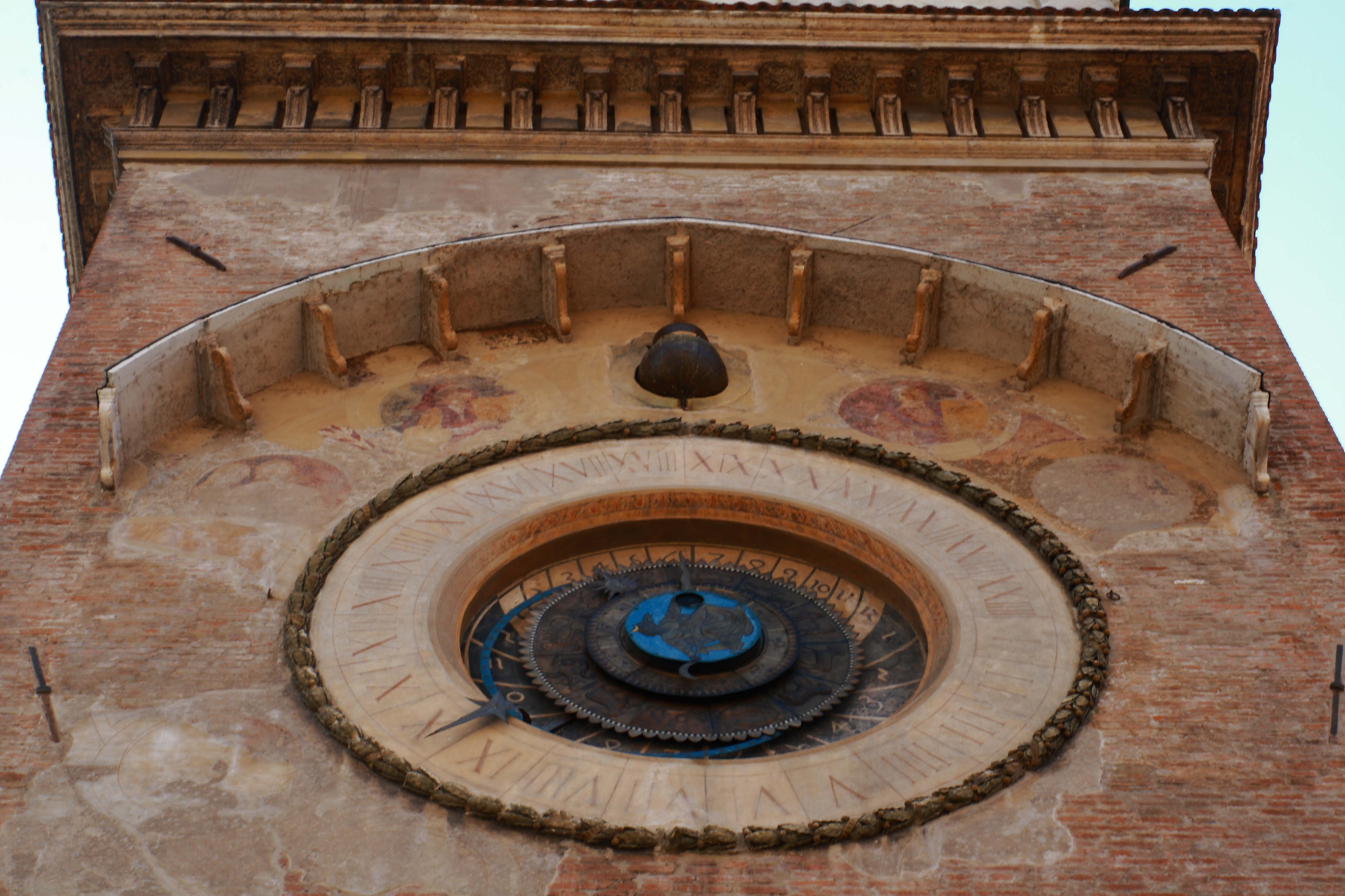 Torre dell'Orologio (esterni) This is a photo of a monument which is part of cultural heritage of Italy.